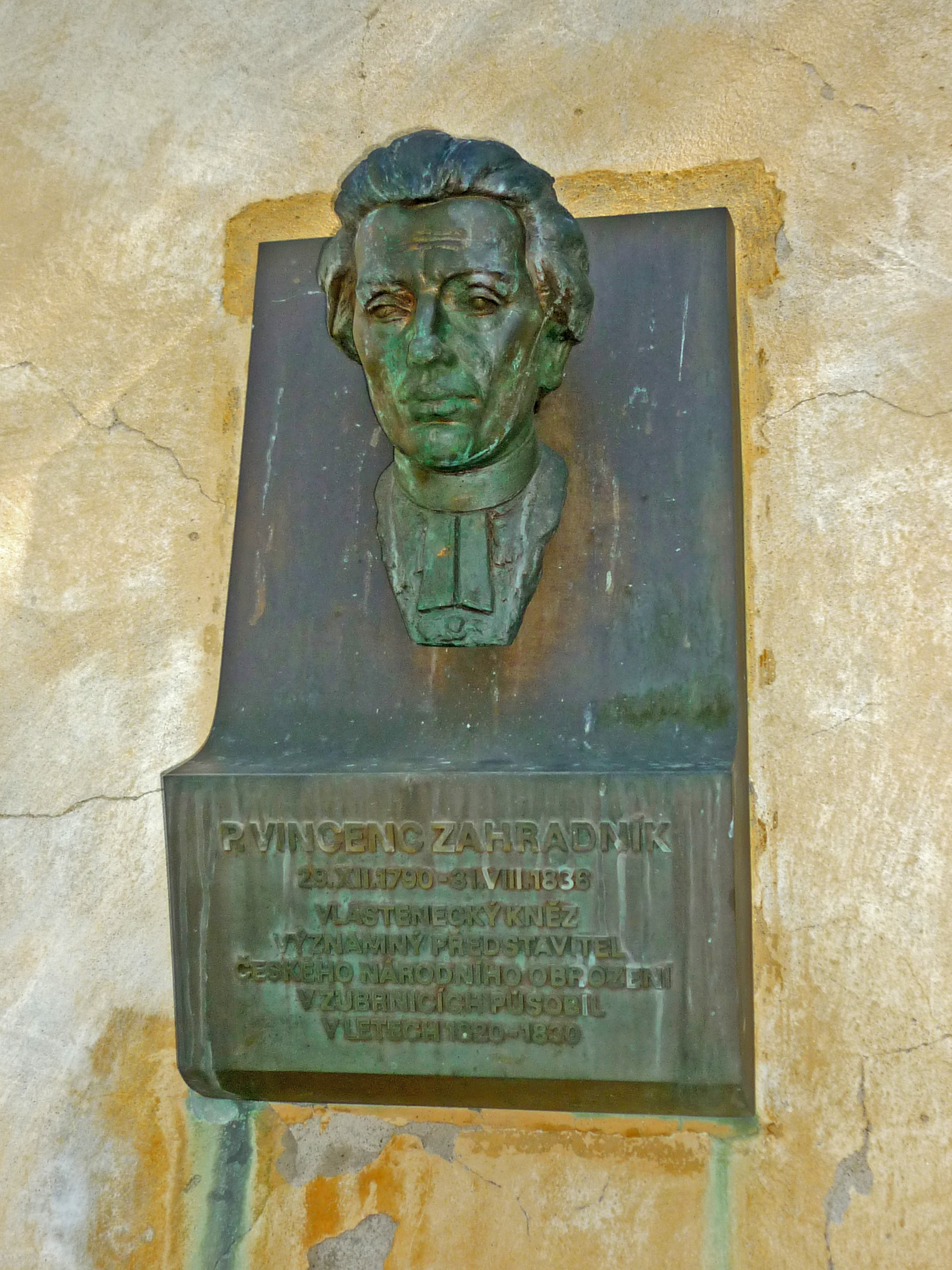 Relief des Pfarrers Vincenc Zahradník (1790–1836) an der Pfarrkirche St. Maria Magdalena in Saubernitz (Zubrnice), Okres Okres Ústí nad Labem